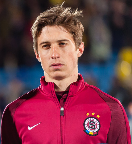 «Ростов» - «Спарта» (16.02.2017)